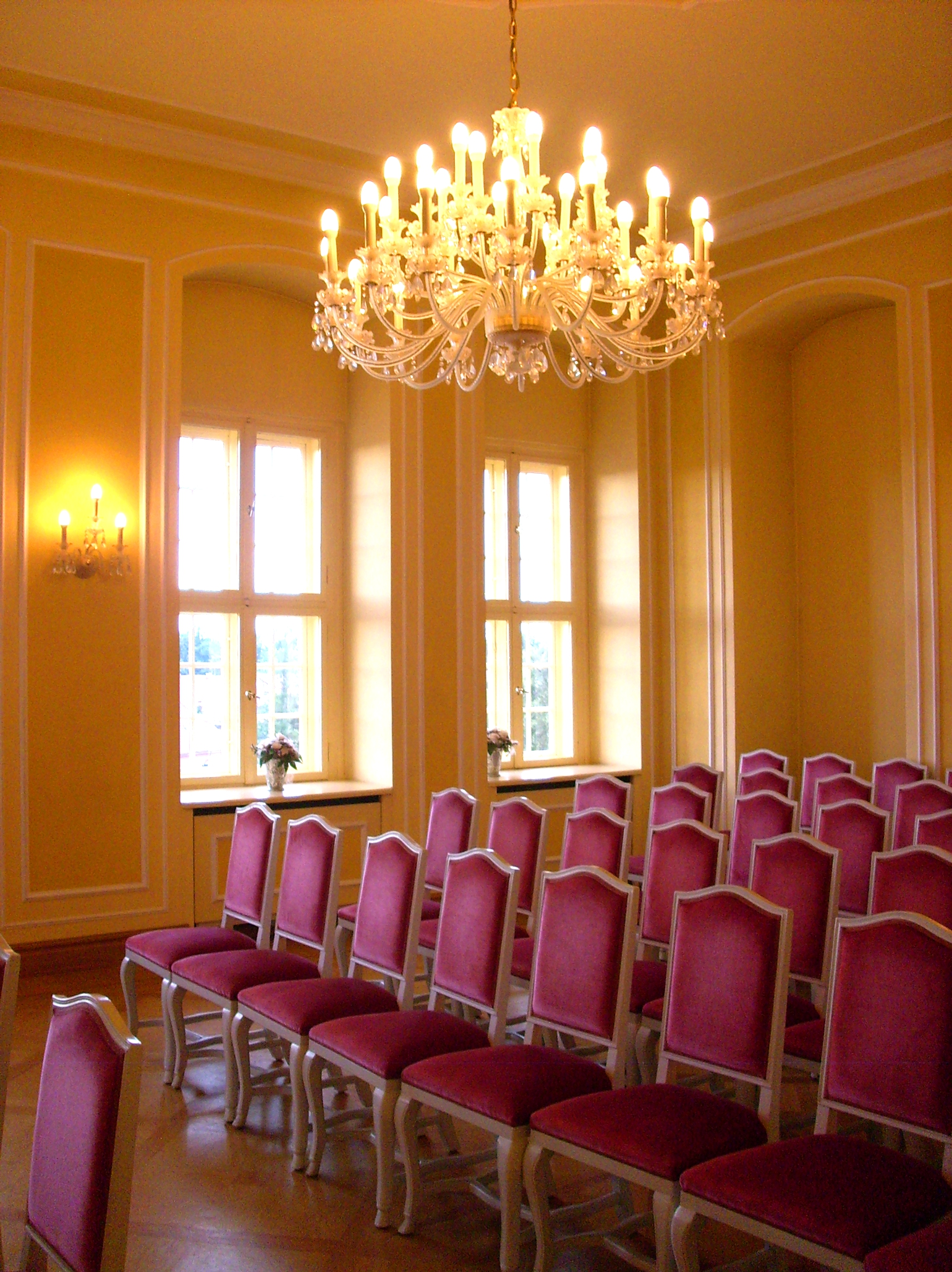 Kaminzimmer im Schloss Hoyerswerda